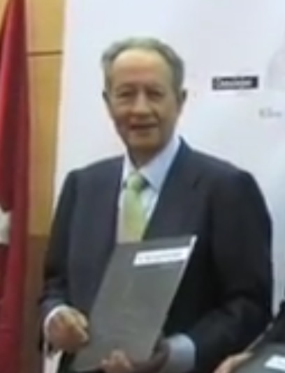 Juan Miguel Villar Mir, Ignacio González, Ana Botella y Juan Villar-Mir de Fuentes en la presentación del proyecto Canalejas.